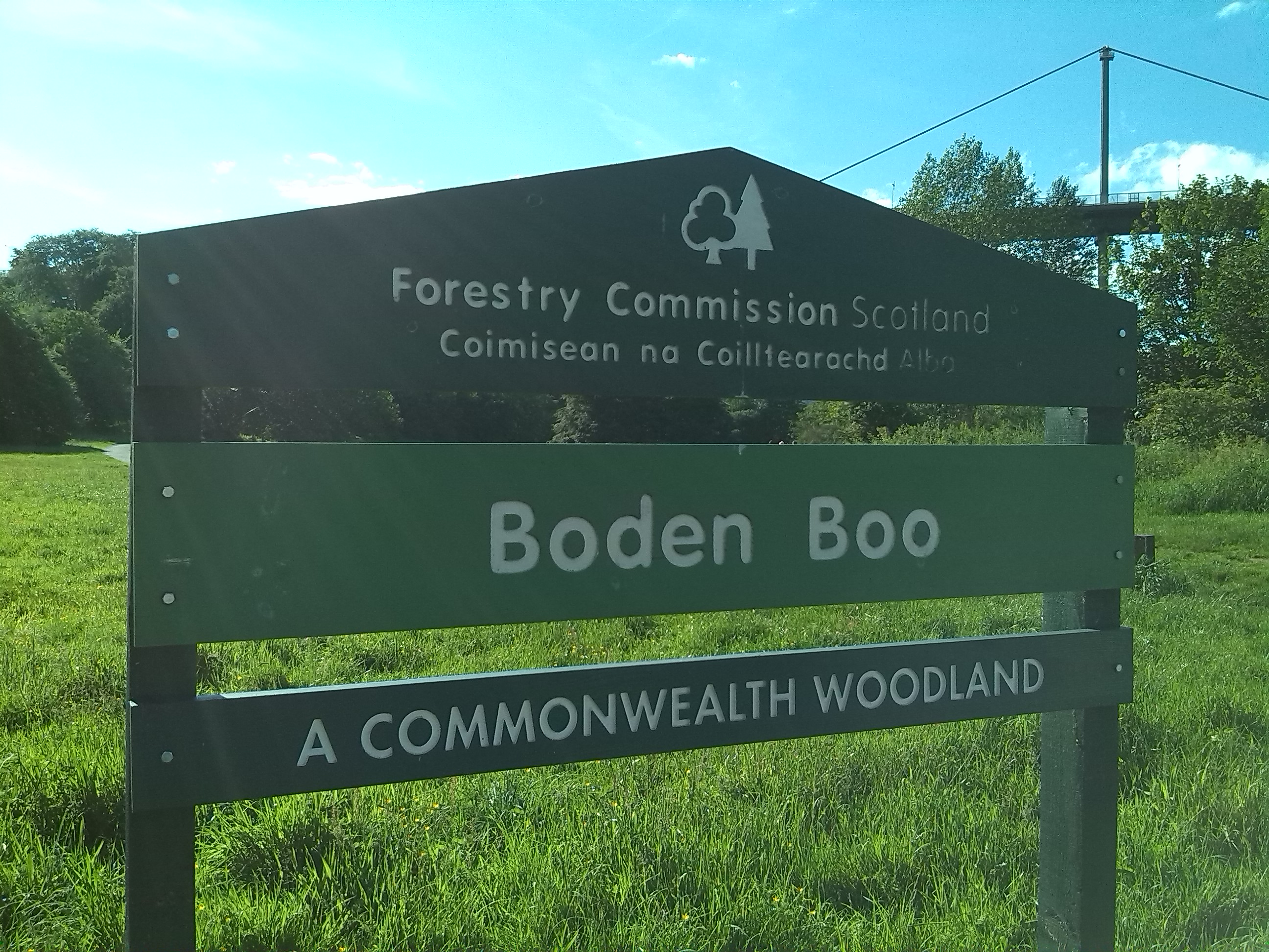 Erskine beach